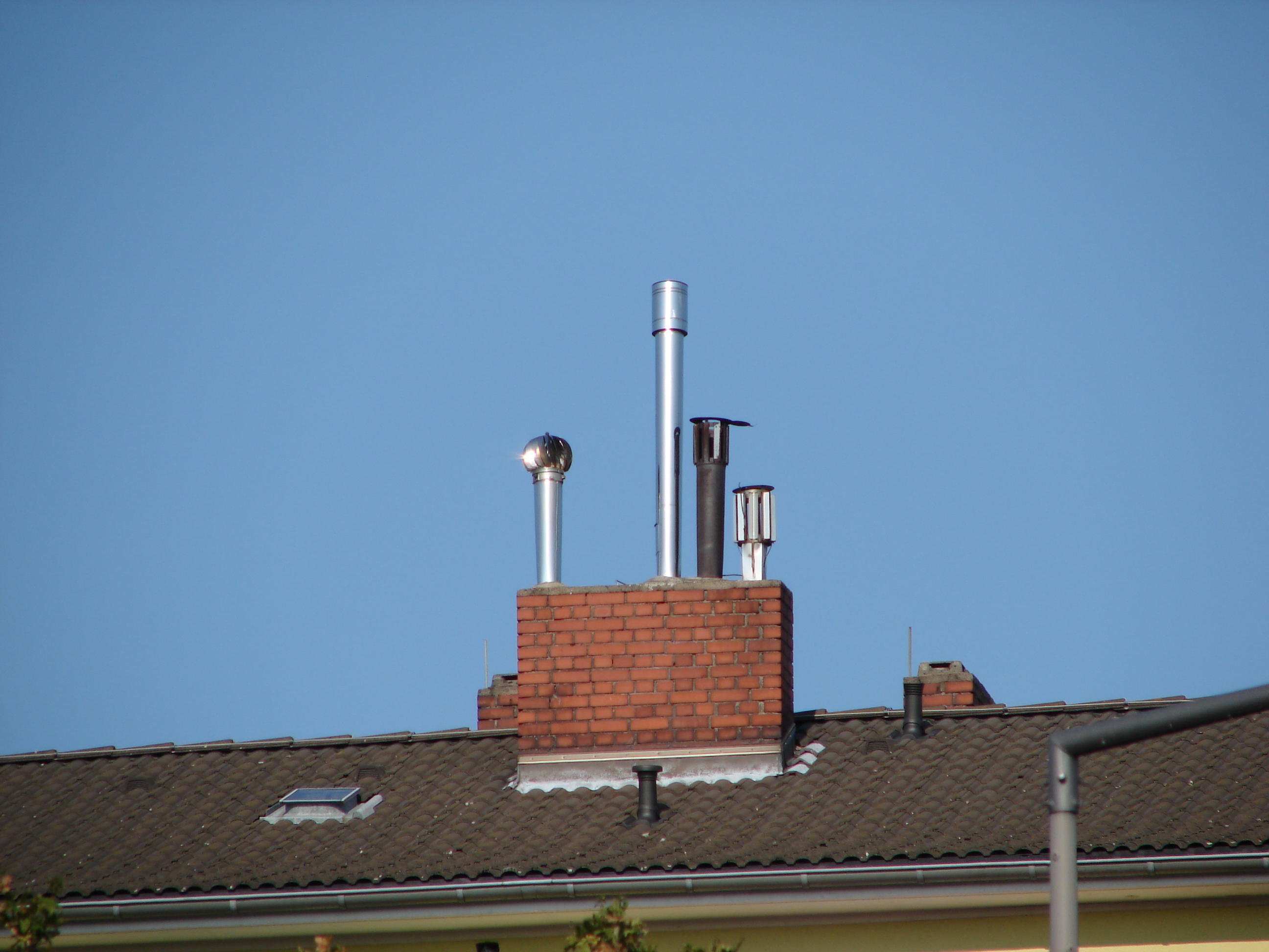 Schornstein, Aufsatz, Verlängerung, Dach, Rost